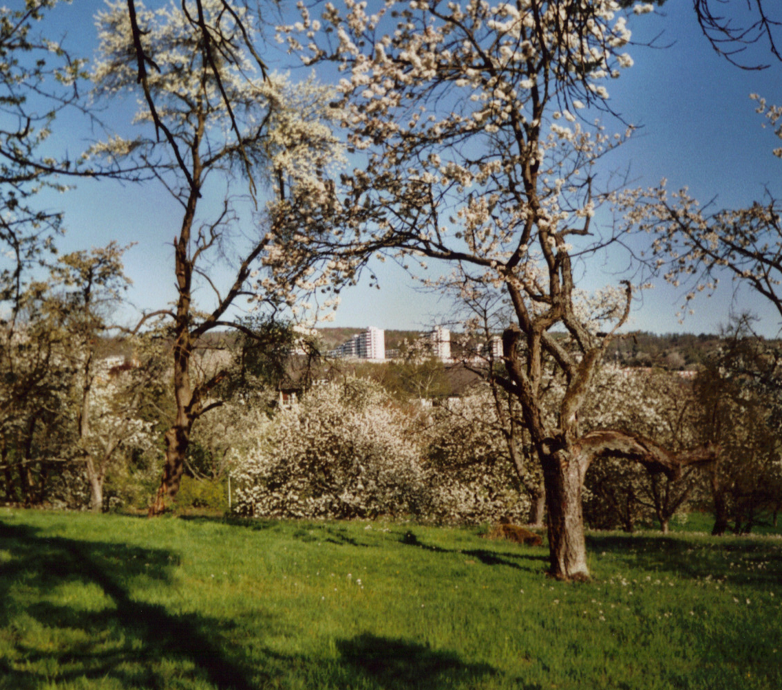 Blick von Hildesheim-Neuhof zum Wohngebiet Trockener Kamp.